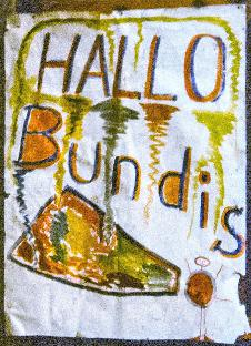 Das Begrüßungsplakat für den ersten kollektiven Gegenbesuch der "Alt"-Bundesbürger in die DDR war an der ersten großen Lärche in Friedrichsthal befestigt. Jürgen Gerner